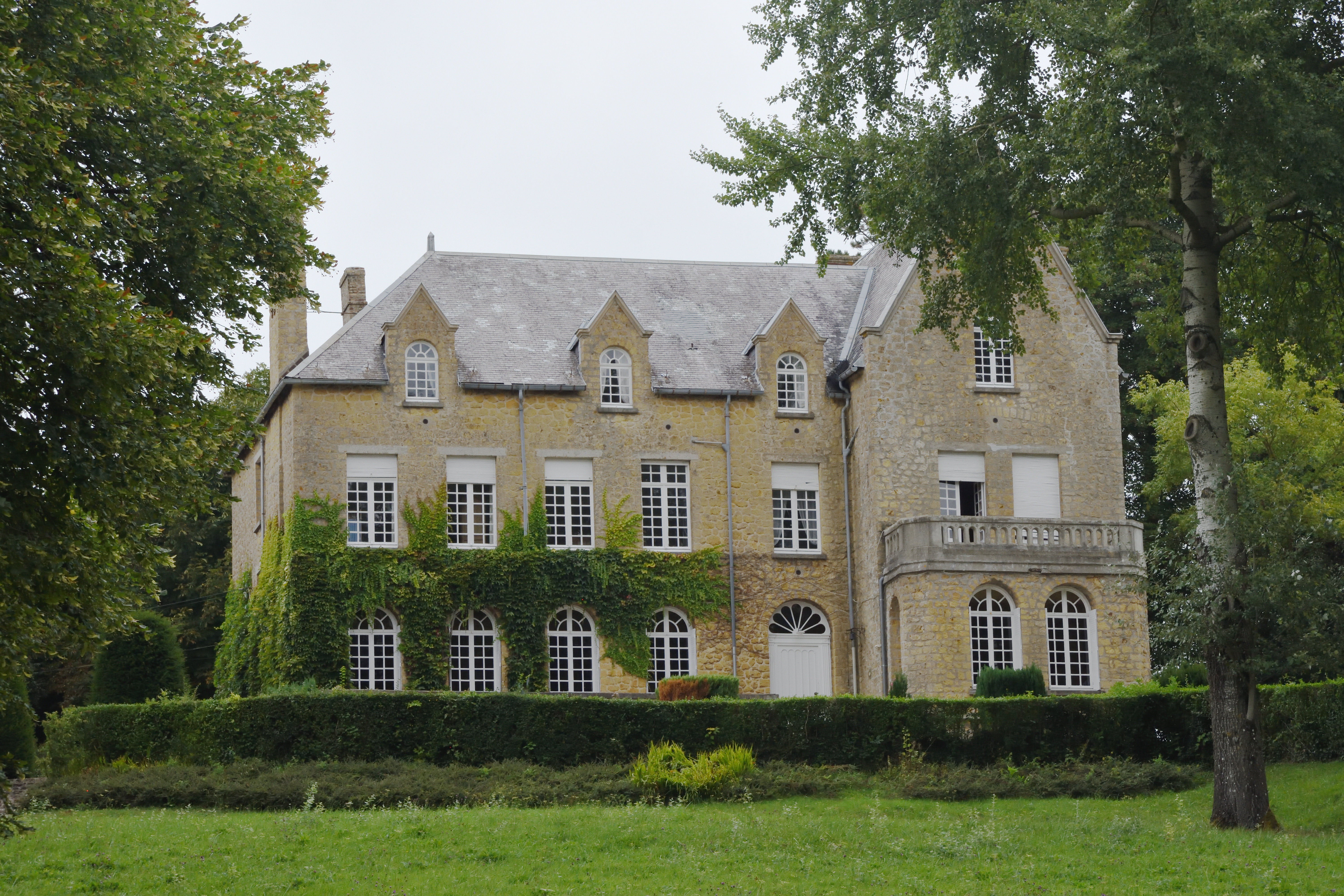 Maison du maître près de Pernes-lès-Boulogne